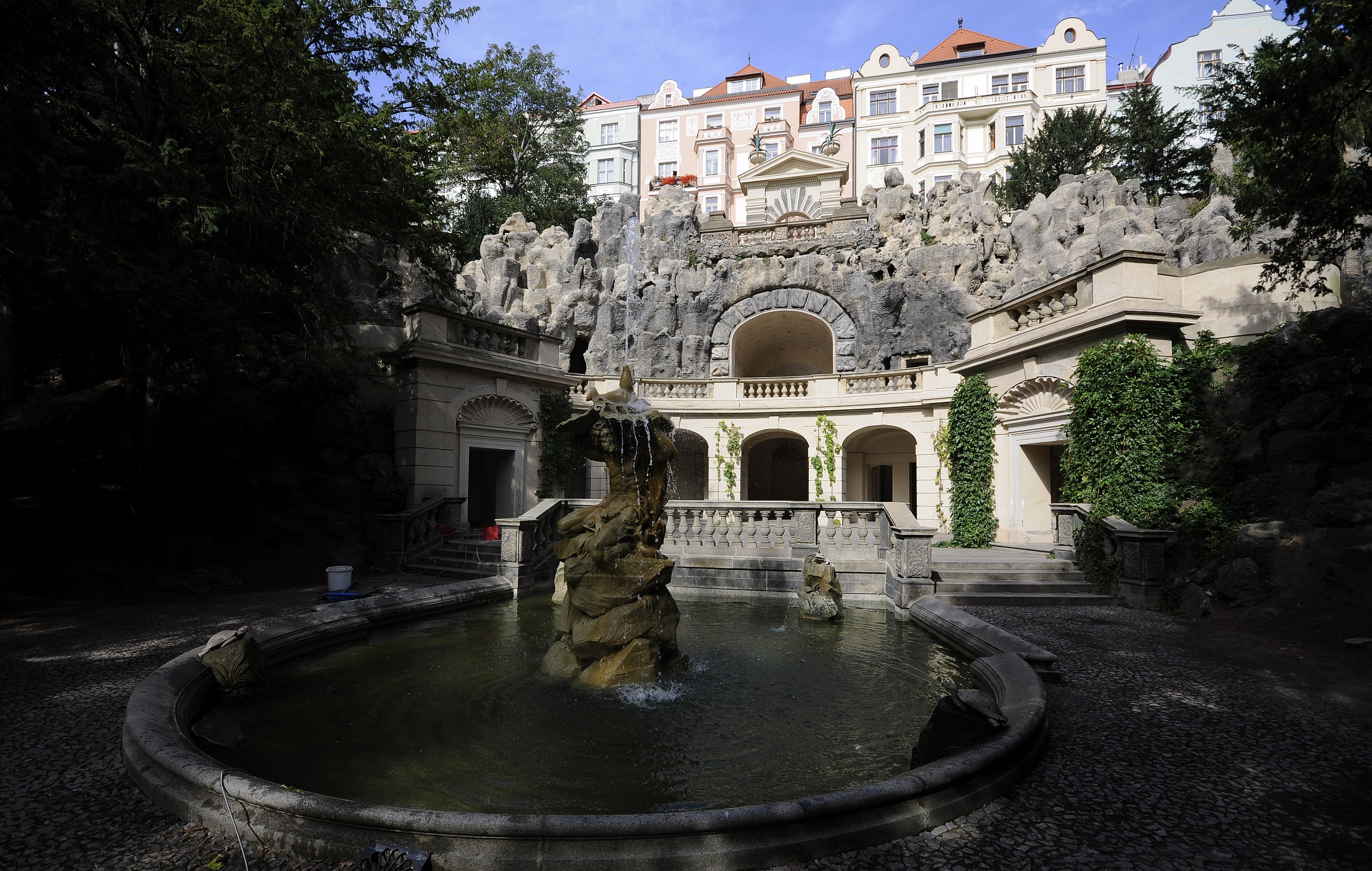 V popředí bazén s fontánou v podobě sochy Neptuna.